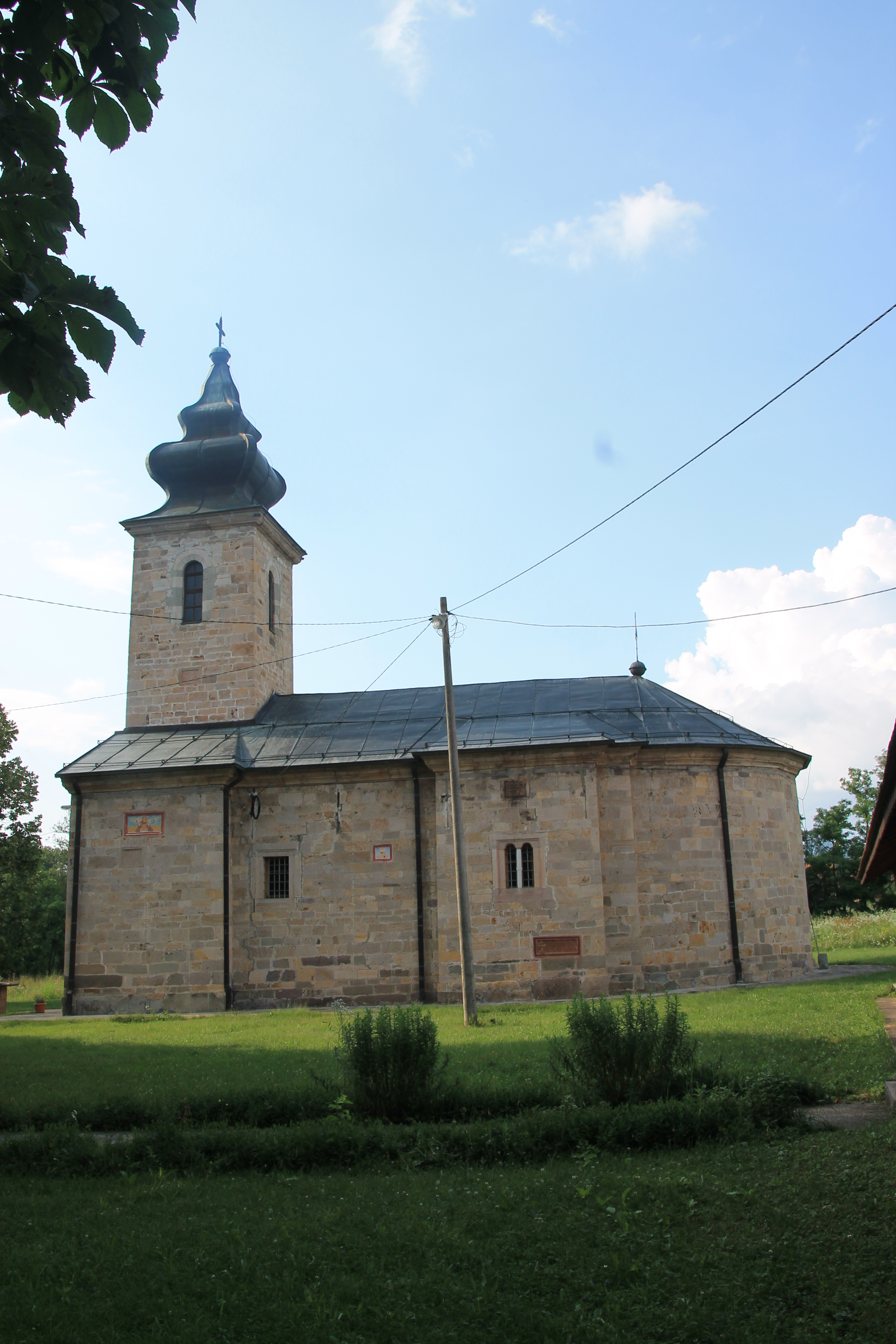 Crkva Sv. Petra i Pavla (Mrčajevci)